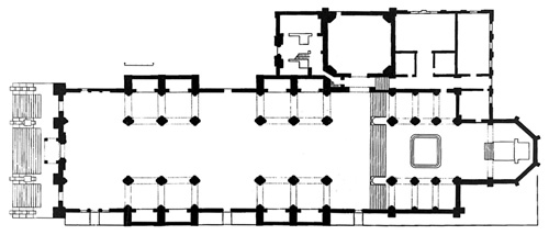 Reggio Calabria:Pianta del Duomo